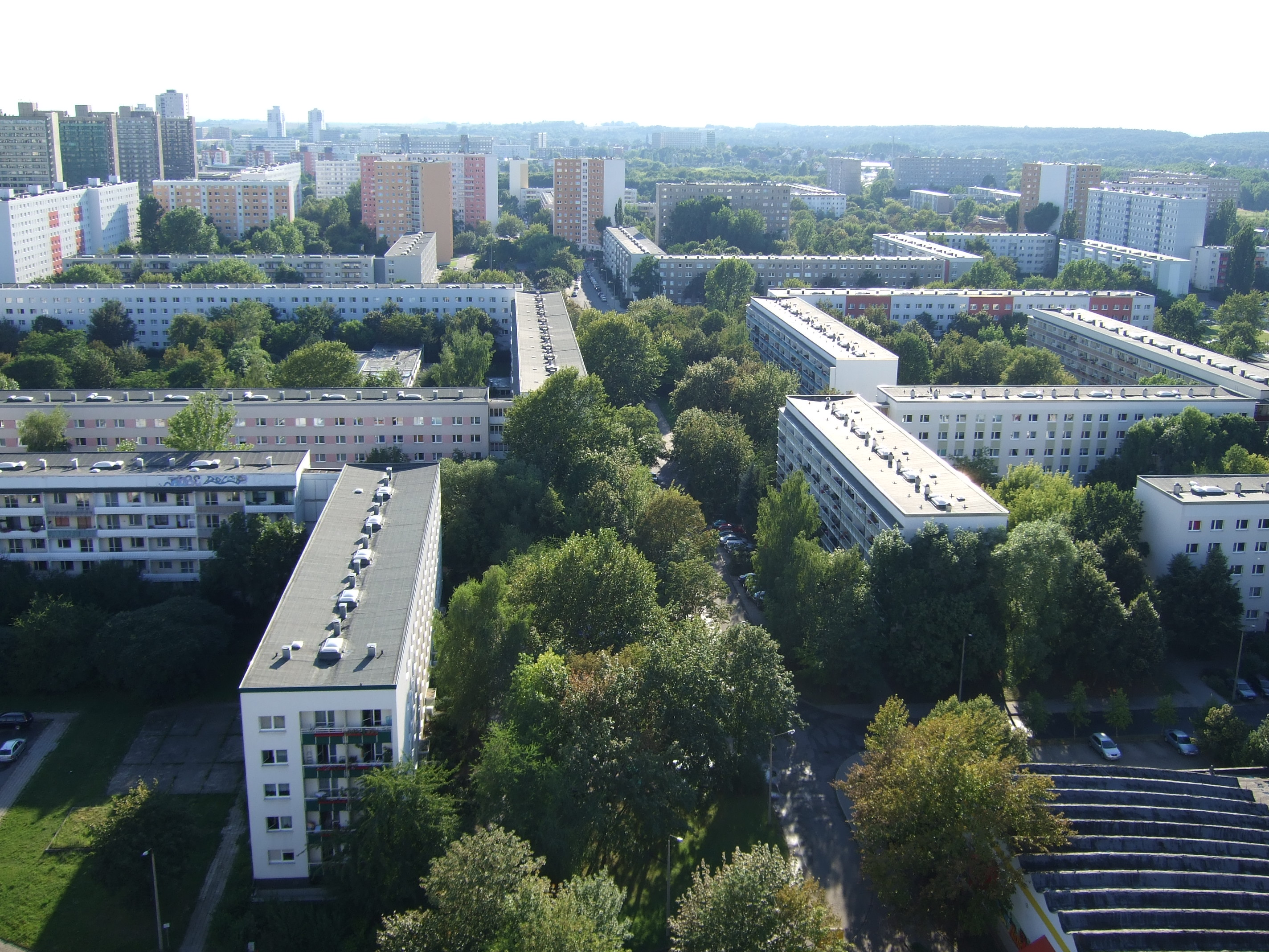 Blick Richtung Westen auf Halle-Neustadt aus der 20ten Etage von Am Tulpenbrunnen 7